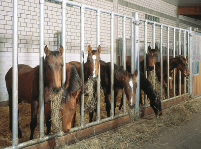 Pferde im Laufstall